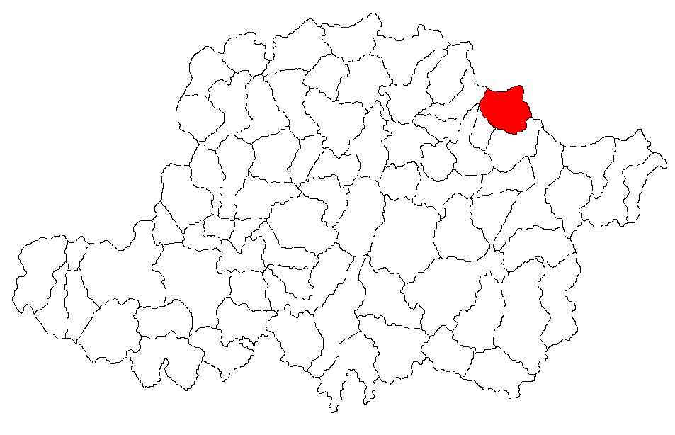 Categorie:Hărţi ale judeţului Arad